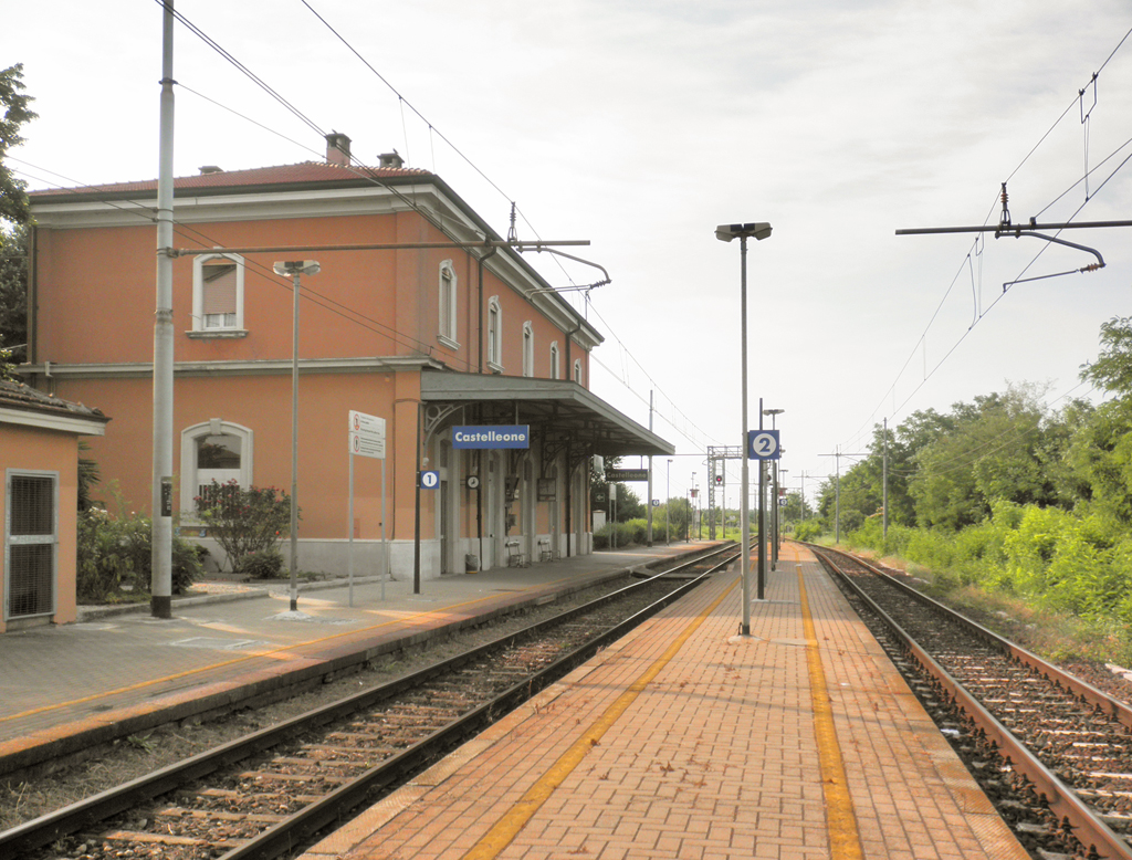 Stazione ferroviaria di Castelleone